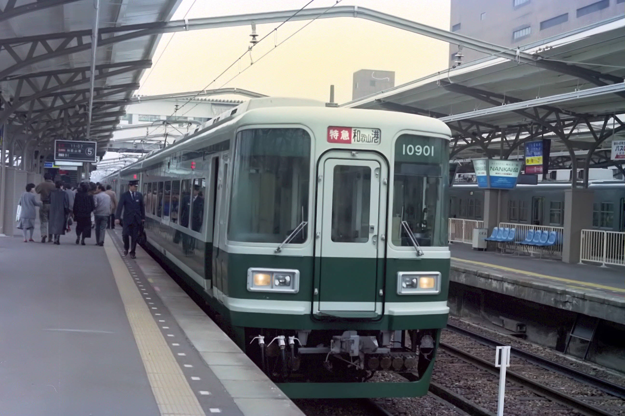 南海 10901 和歌山市駅